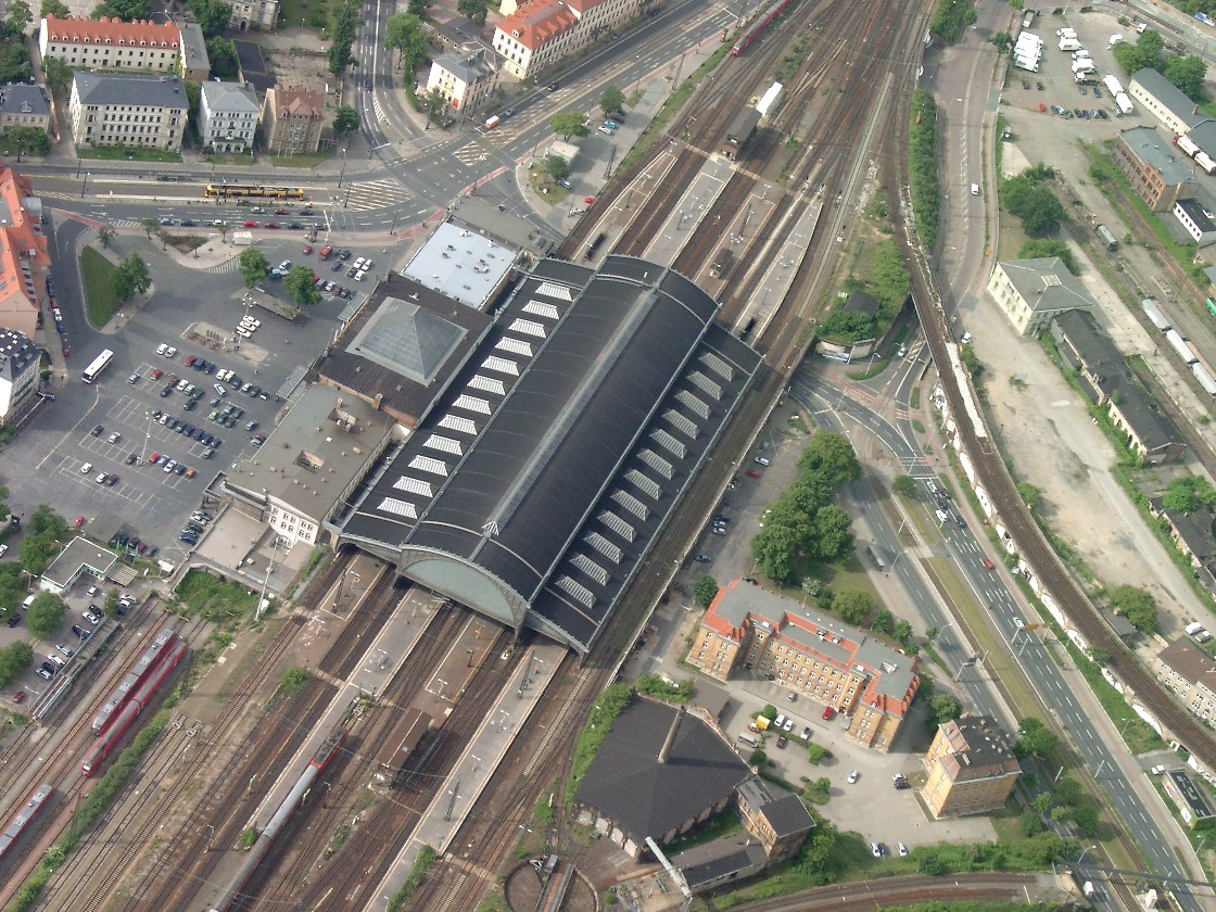 Luftbild des Dresdner Bahnhof Neustadt mit Blick in Südrichtung (oben), links ist der Schlesische Platz vor dem Umbau (im Jahr 2006) zu sehen, daran angrenzend die Straßenbahnhaltestelle in der Antonstraße. Gegenüber dem Westausgang (rechts) befindet sich die Straßenbahnbedarfshaltestelle Bahnhof-Neustadt Hansastraße. Nach oben weg führen die Gleise in Richtung Hauptbahnhof.